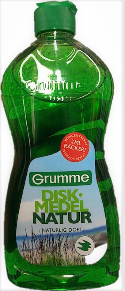 Bild på Grummes diskmedel med "naturlig doft".